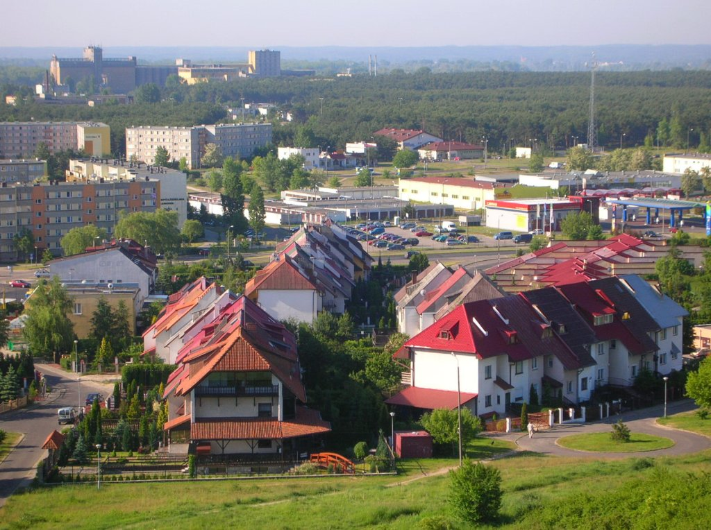 Widok z Góry Szybowników w Fordonie